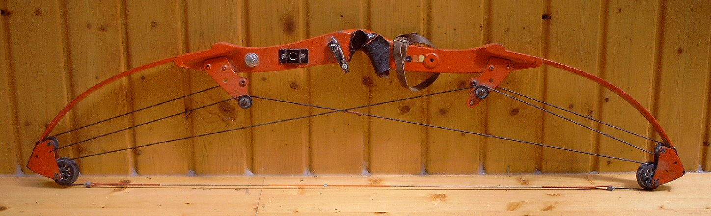 4Wheeler von Baer